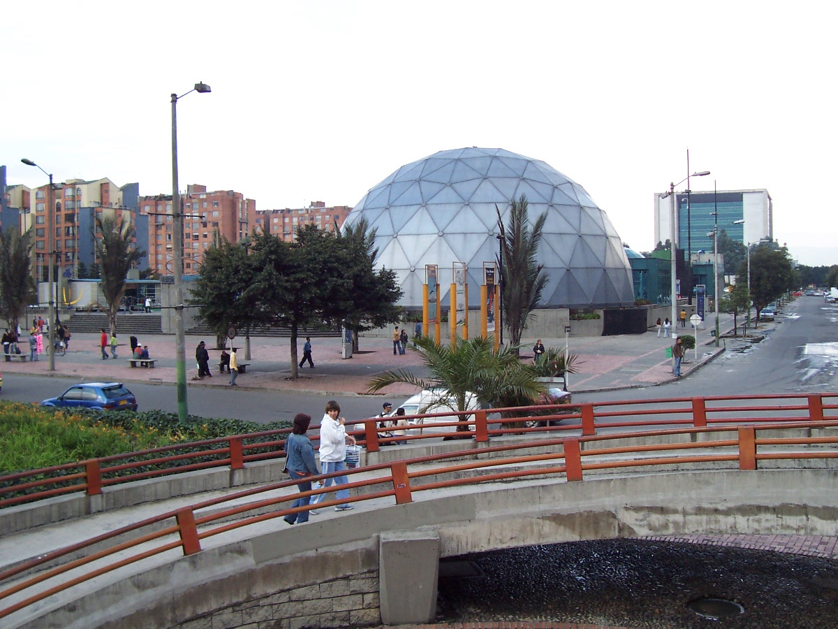 Maloka in Bogotá Colombia, October 14, 2006